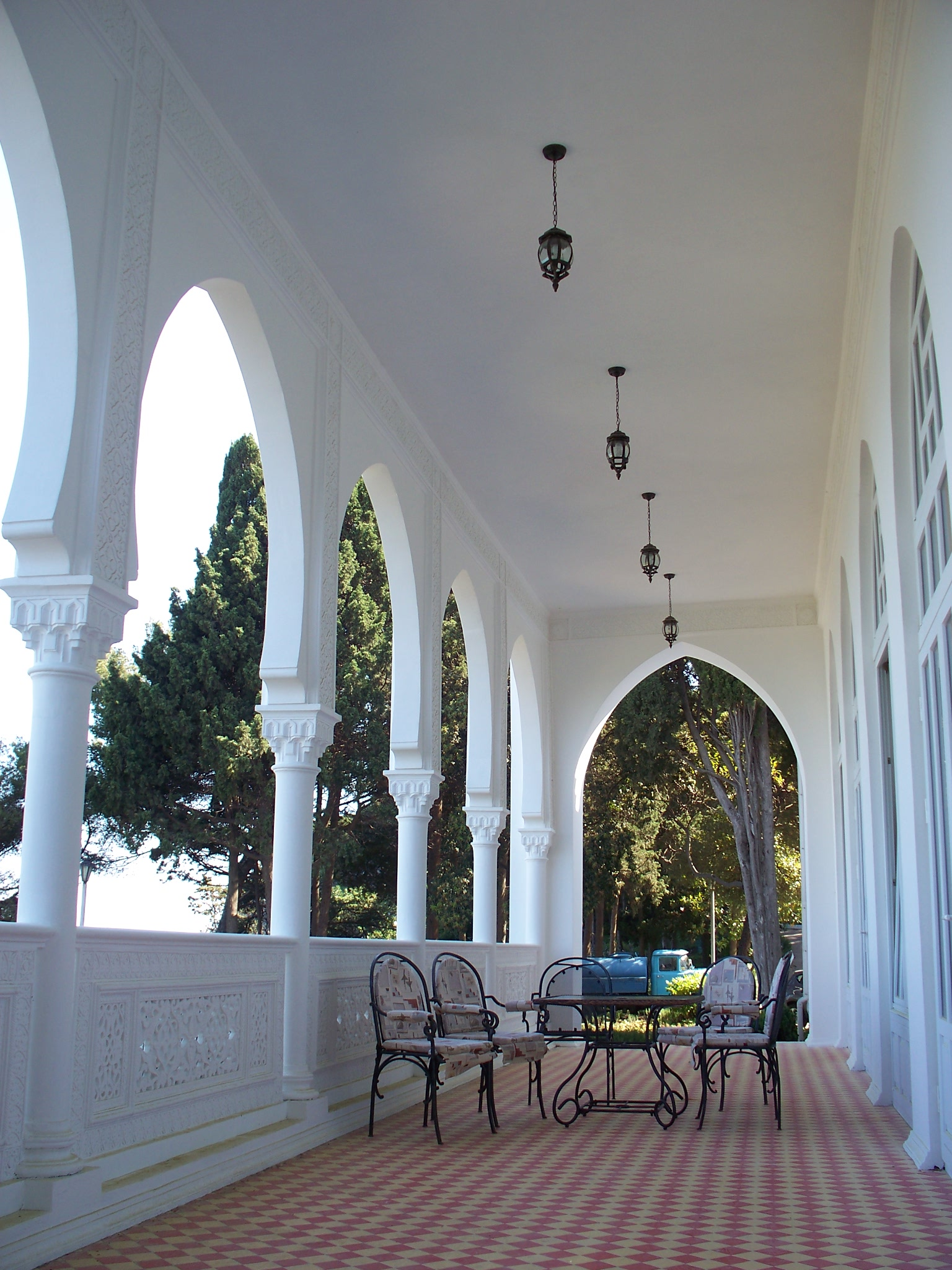 Дача «Кічкіне», Гаспра, вул. Алупкінське шосе, 1, літер «В»